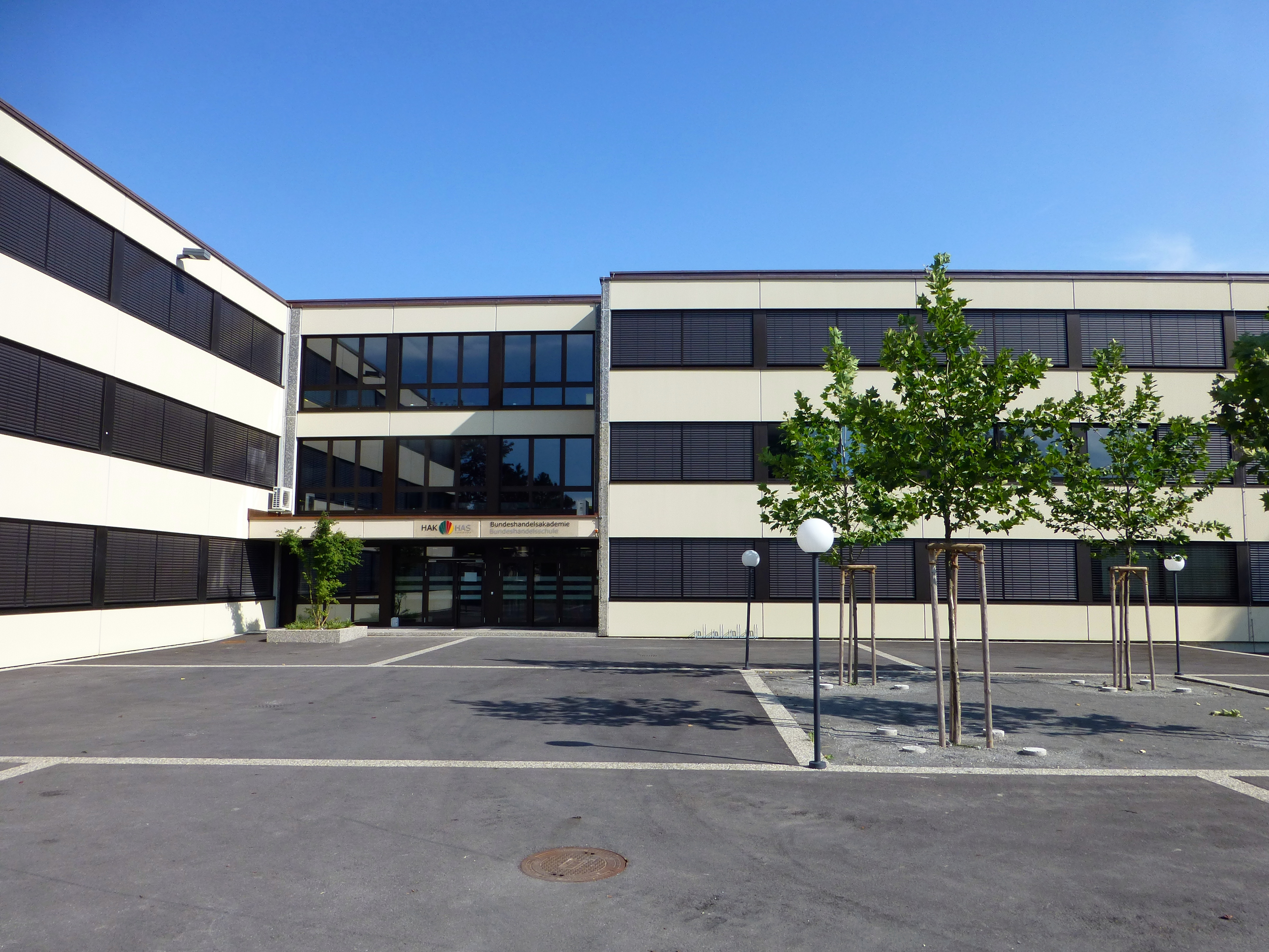 das Gebäude der Bundeshandelsakademie und Bundeshandelsschule Lustenau